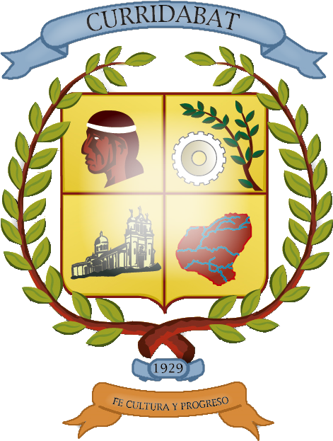 Bandera del Cantón de Curridabat, Costa Rica.